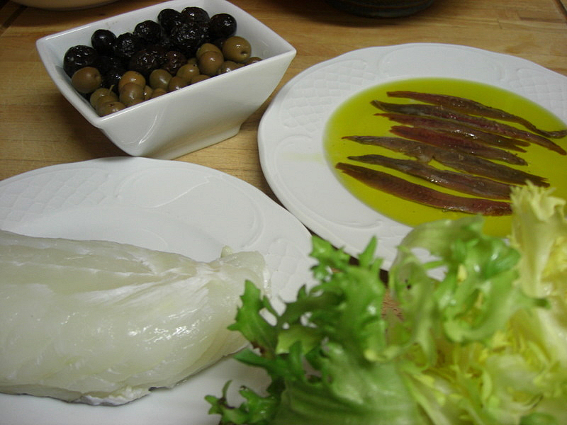 Ingredients per a una amanida de bacallà esqueixat, olives, anchoves, escarola i tonyina.